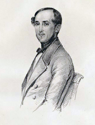 Carl David Arfwedson (1806-1881)